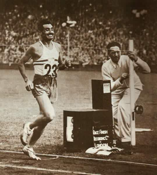 Delfo Cabrera, Final de la Maratón de los Juegos Olímpicos de Londres, 7 de agosto de 1948